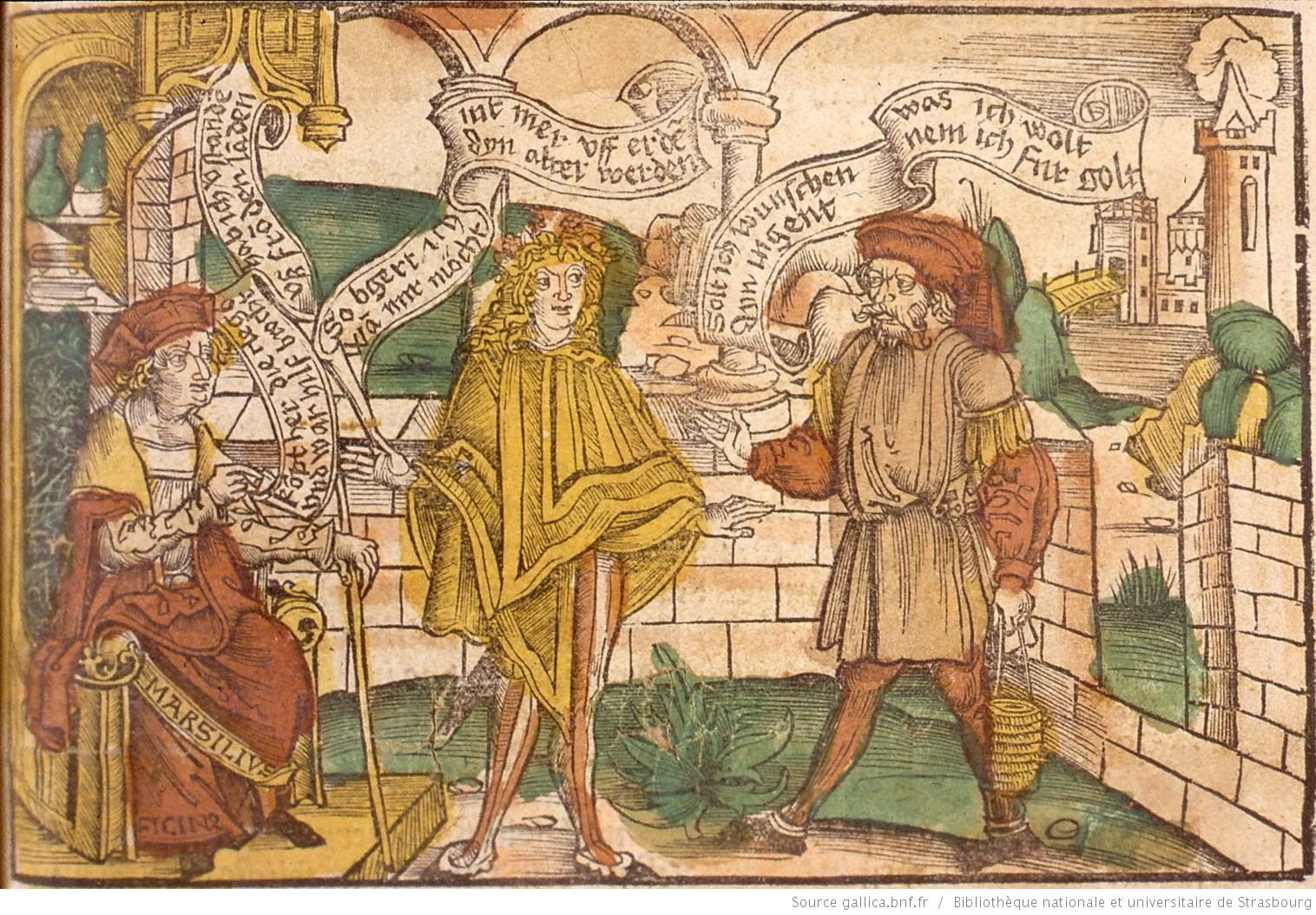 Titre : Marsilius Ficinus enseignant (TR) Date d'édition : 1509 Sujet : Strasbourg Sujet : VIE QUOTIDIENNE, Médecine Type : image fixe Langue : Allemand Format : 1 pl. coloriée ; 10 x 15,5 cm Format : image/jpeg Droits : domaine public Identifiant : ark:/12148/btv1b102188043 Source : Bibliothèque nationale et universitaire de Strasbourg, NIM32820 Relation : Description : Appartient à l’ensemble documentaire : BNUStr003 Provenance : bnf.fr Date de mise en ligne : 23/09/2013